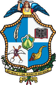 Escudo de la ciudad San miguel.